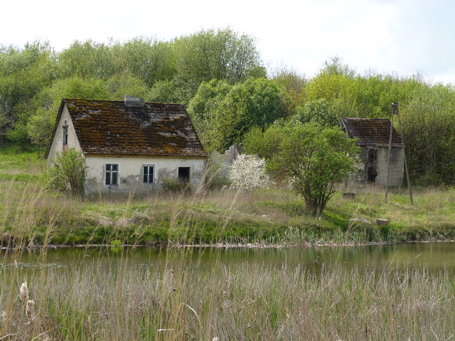 Hofanlage (Ruine) Krühne.